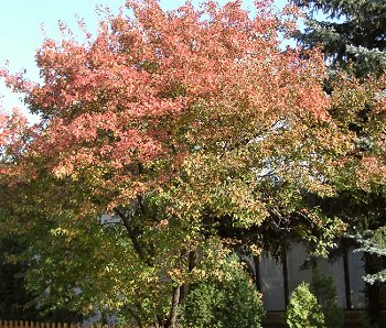 Feuer-Ahorn (Acer ginnala) Habitus/ Gesamtansicht im Herbst